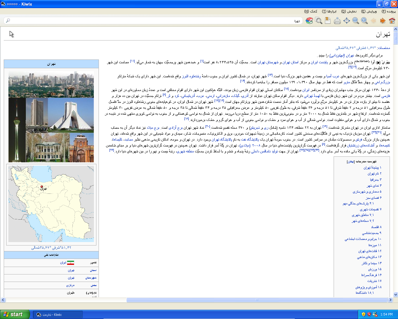 Capture d'écran de Kiwix avec Wikipédia en farsi